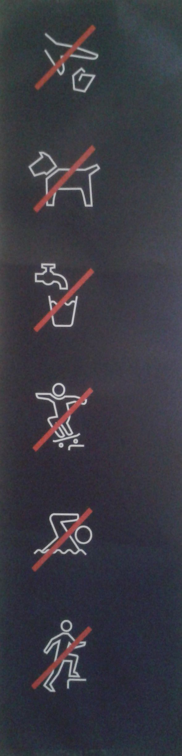 Piktogramme am Gedenkbrunnen und auf den Infostelen, Platz der Alten Synagoge, Freiburg